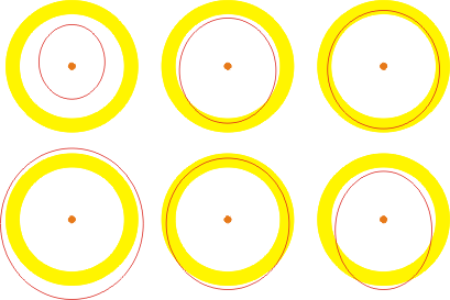 Définitions d'orbites ; Une convention possible Les six diagrammes ci-dessus montrent le Soleil au centre (le point orange) et la bande orbitale (en jaune) d'une planète quelconque. Les rebords de cette bande sont définis par le périhélie (rebord intérieur) et l'aphélie (rebord extérieur) de la planète. À gauche, en haut : L'orbite de la planète mineure est entièrement contenue par celle de la planète —elle est intérieure. À gauche, en bas : L'orbite de la planète mineure contient entièrement celle de la planète —elle est extérieure. Au centre, en haut : L'orbite de la planète mineure pénètre celle de la planète par l'intérieur sans la traverser —c'est un frôleur-intérieur. Au centre, en bas : L'orbite de la planète mineure pénètre celle de la planète par l'extérieur sans la traverser —c'est un frôleur-extérieur. À droite, en haut : L'orbite de la planète mineure est entièrement confinée par celle de la planète —elle est co-orbitale. À droite, en bas : L'orbite de la planète mineure traverse celle de la planète de l'intérieur à l'extérieur —c'est un croiseur.